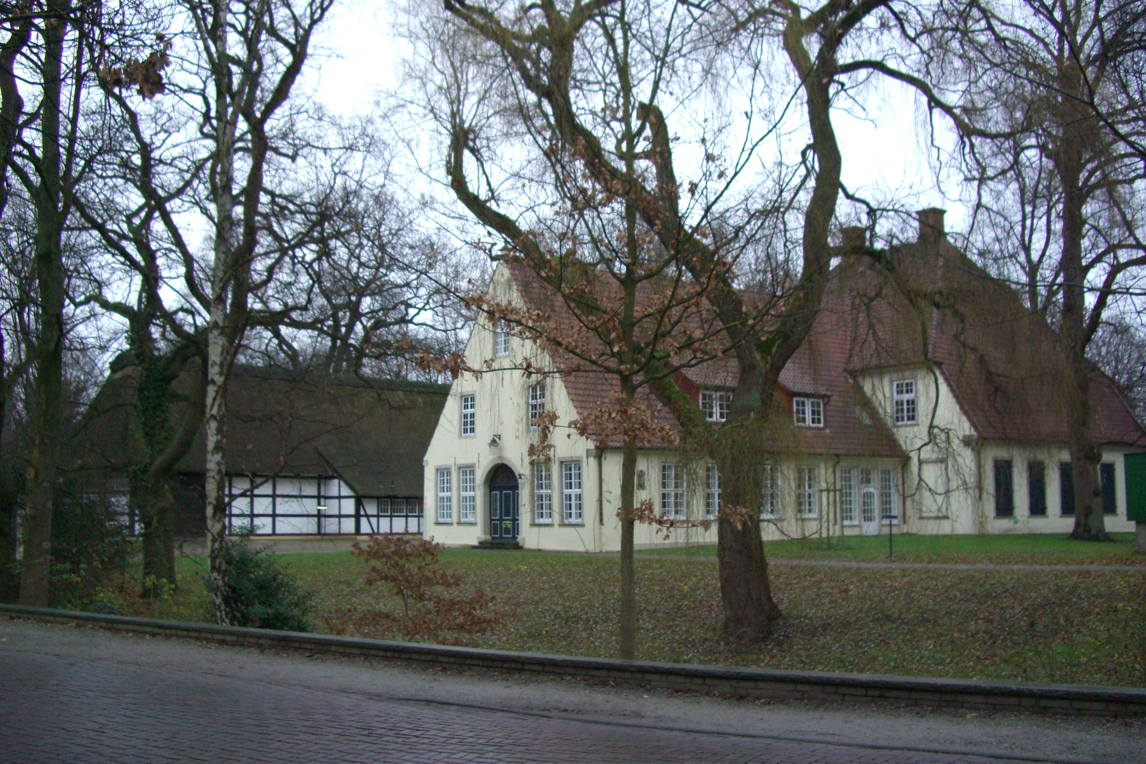 Gut Riensberg in Bremen, Sicht von NW, vorne Haupthaus, Scheune im Hintergrund Focke-Museum Native nameFocke-MuseumLocationBremen, GermanyCoordinates53° 05′ 33″ N, 8° 51′ 51″ E Established1918/1959Website